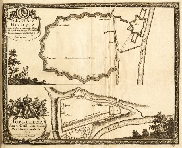 Scan from Johann Christoph Brotze's book Sammlung verschiedner Liefländischer Monumente. [1] Urbs et Arx Mitova [1659; der Plan; die Gravüre]. [2] Dobbleena Arx ... [1659; der Plan; die Gravüre].